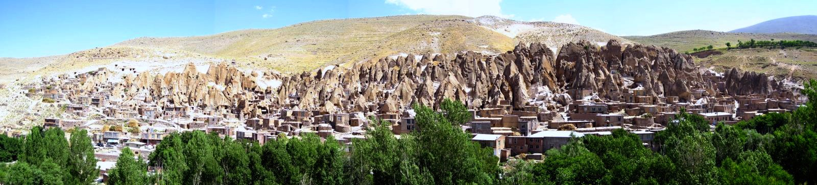 Best seen large